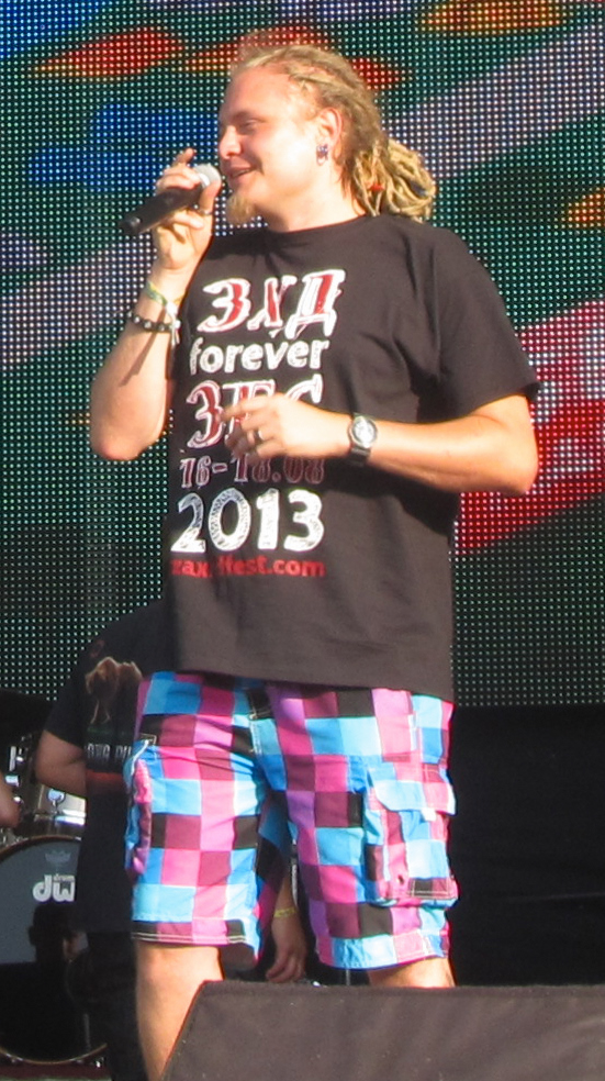 Ведучий фестивалю Захід М'яч